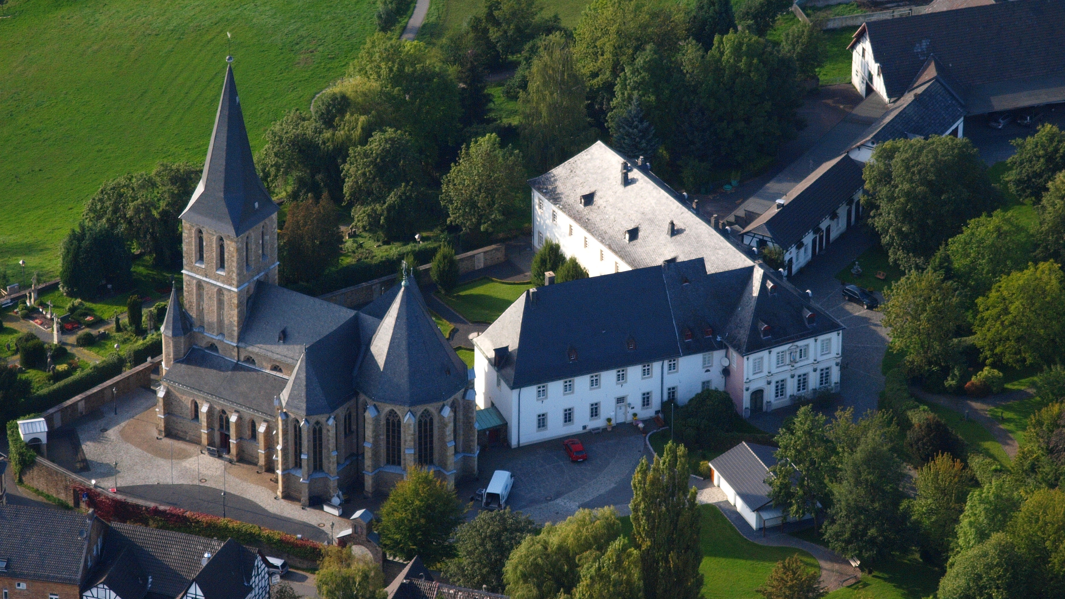 Wallfahrtskirche Zur schmerzhaften Mutter Gottes (links), Pfarrhaus (Mitte) und ehemaliges Kloster (rechts), An der Klostermauer 14–16/Klostergut 1, Hennef (Sieg)-Bödingen: Luftaufnahme